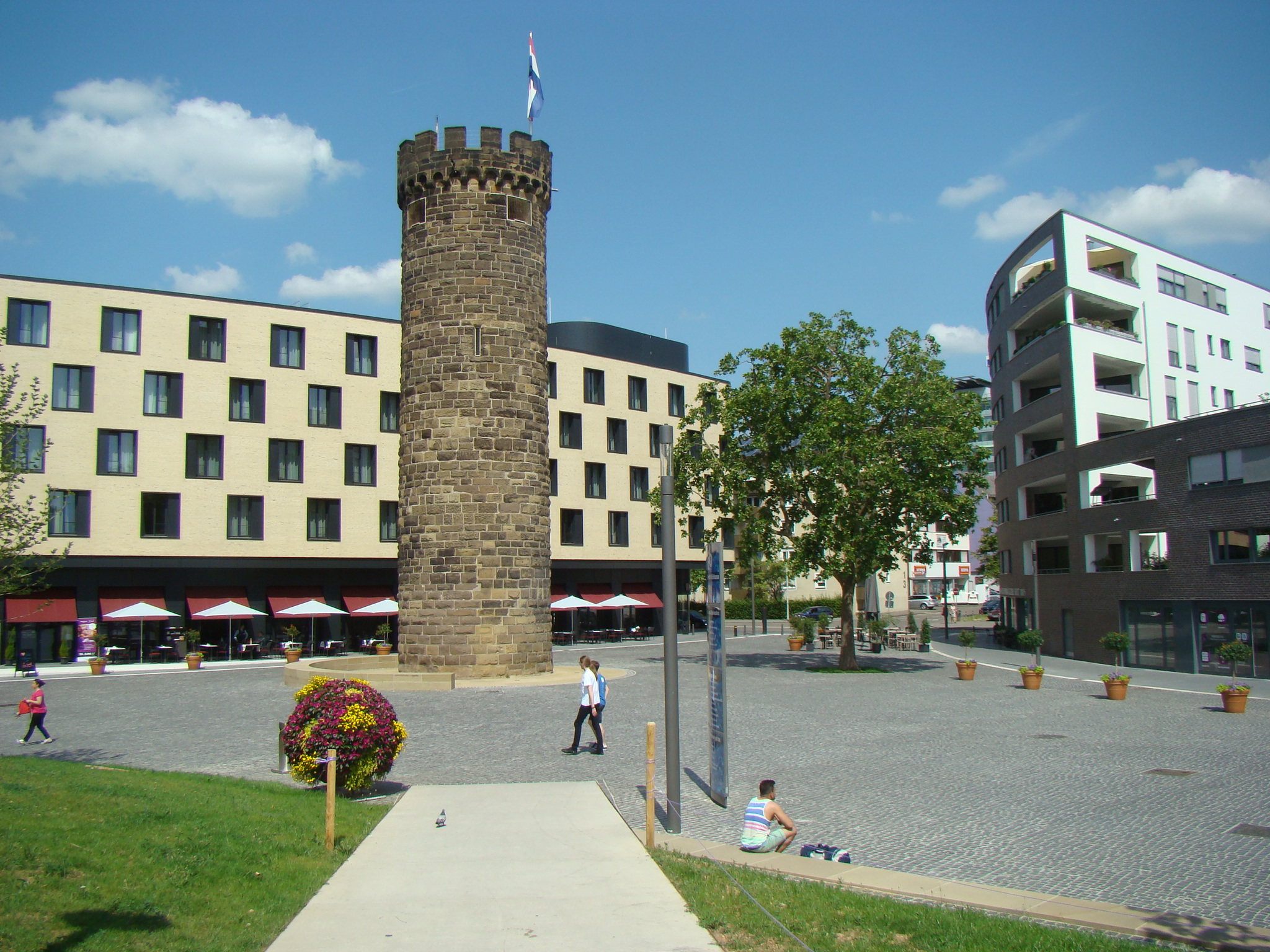 Bollwerksturm in Heilbronn